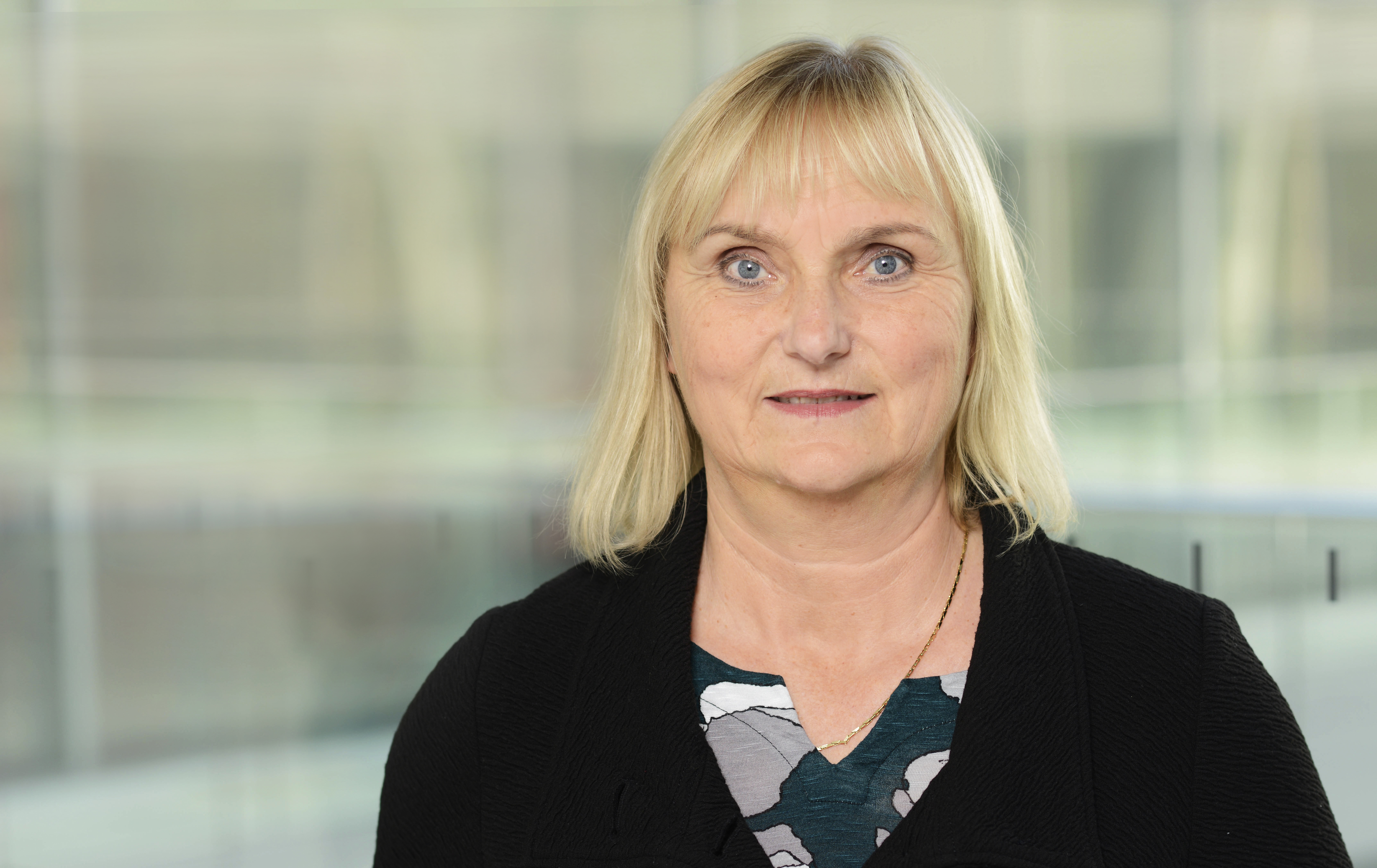 Bettina Hoffmann MdB, Bündnis 90/Die Grünen Bundestagsfraktion